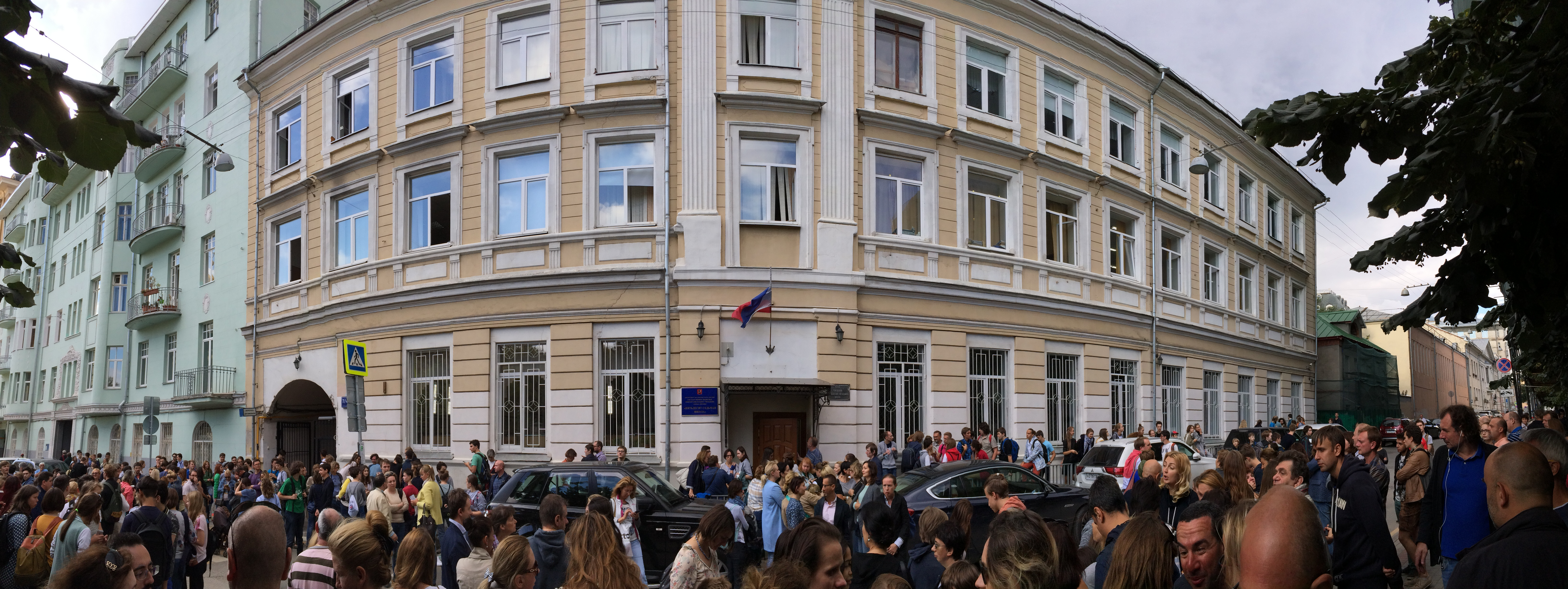 В ожидании приезда руководства школы